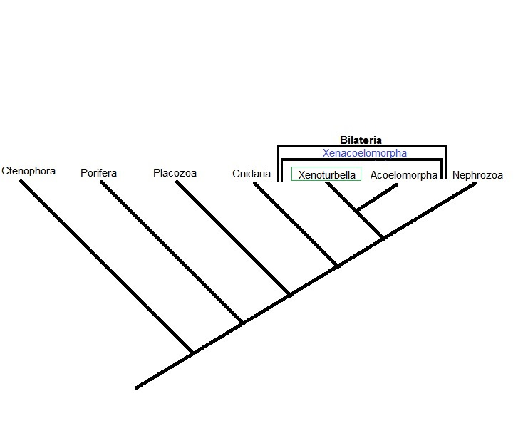 Position phylogénétique du groupe soeur Xenacoelomorpha constitué de Xenoturbella et Acoelomorpha